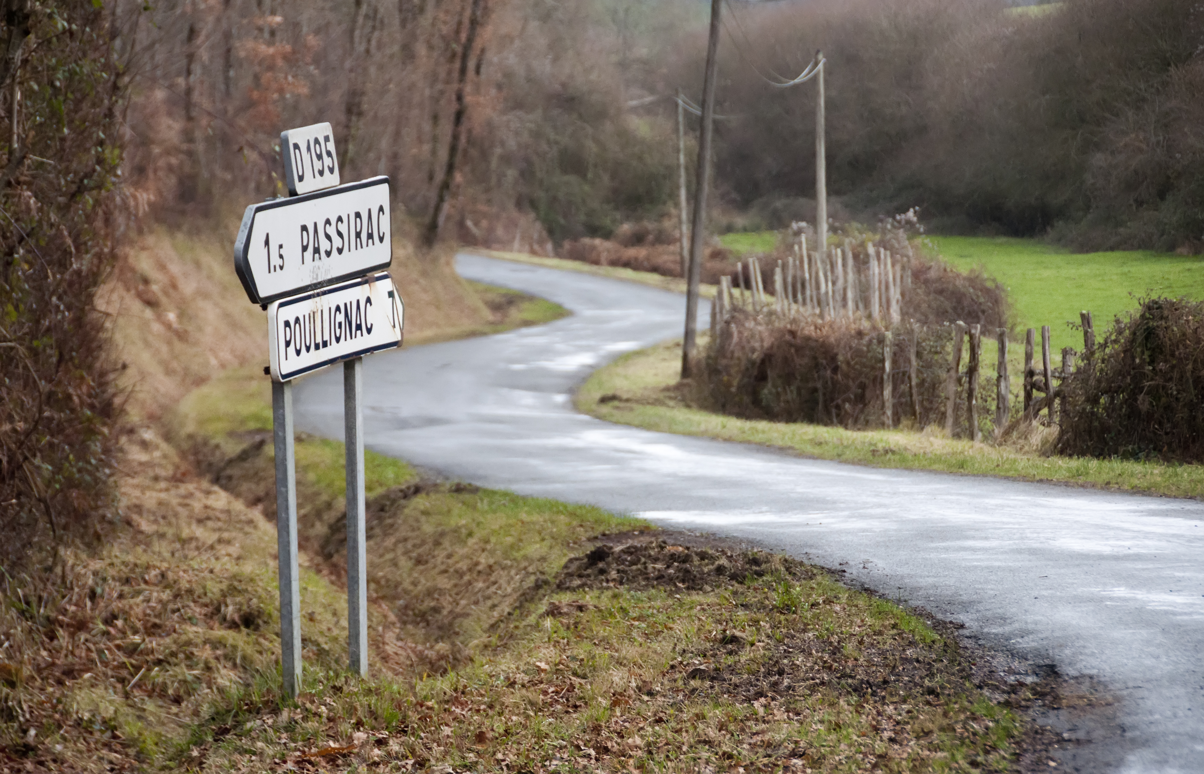 Panneau d'indication de Passirac